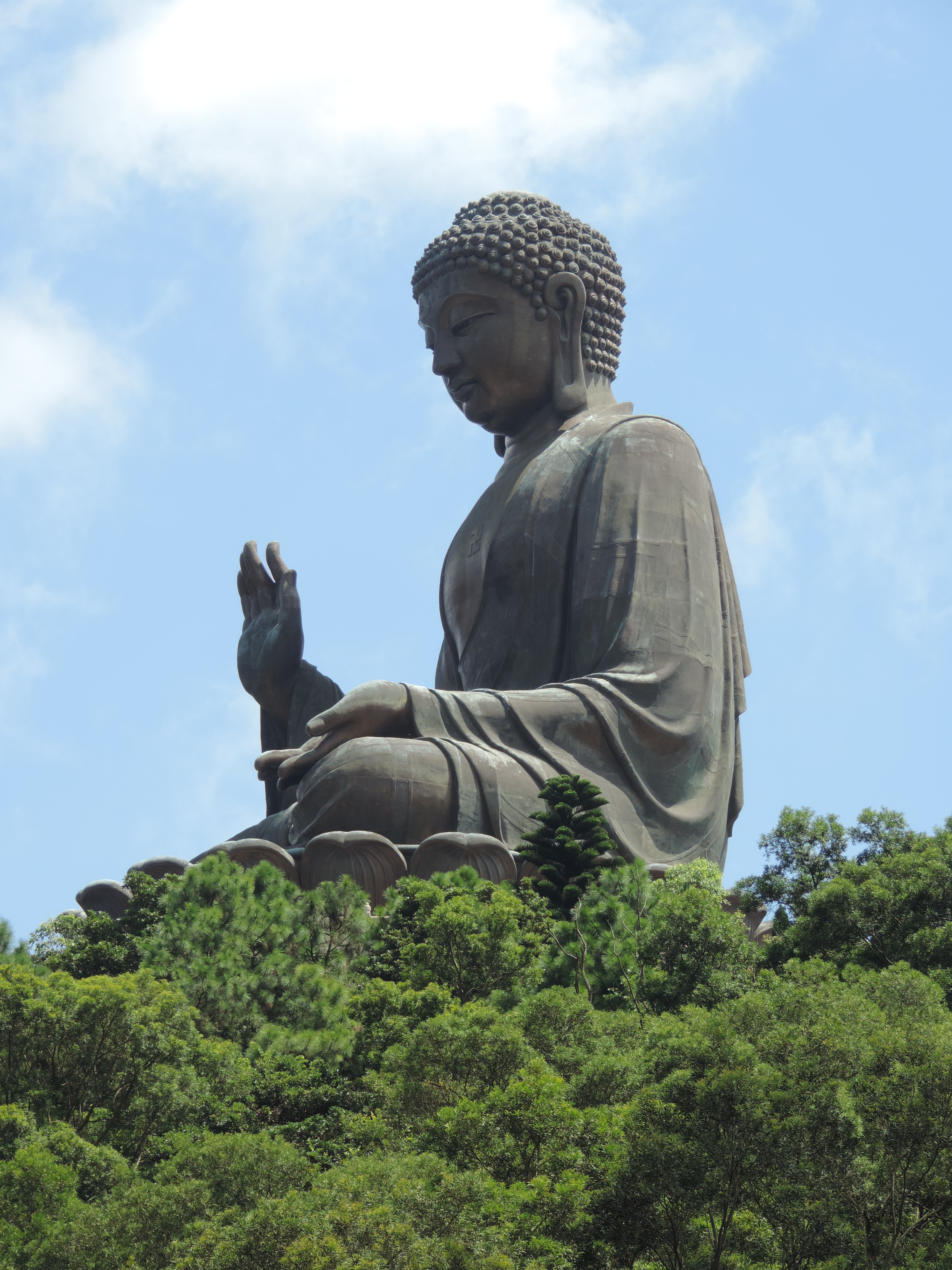 Estátua do Grande Buda (The Big Buddha ou Tian Tan Buddha) na ilha de Lantau, Hong Kong, obtida em agosto de 2013.